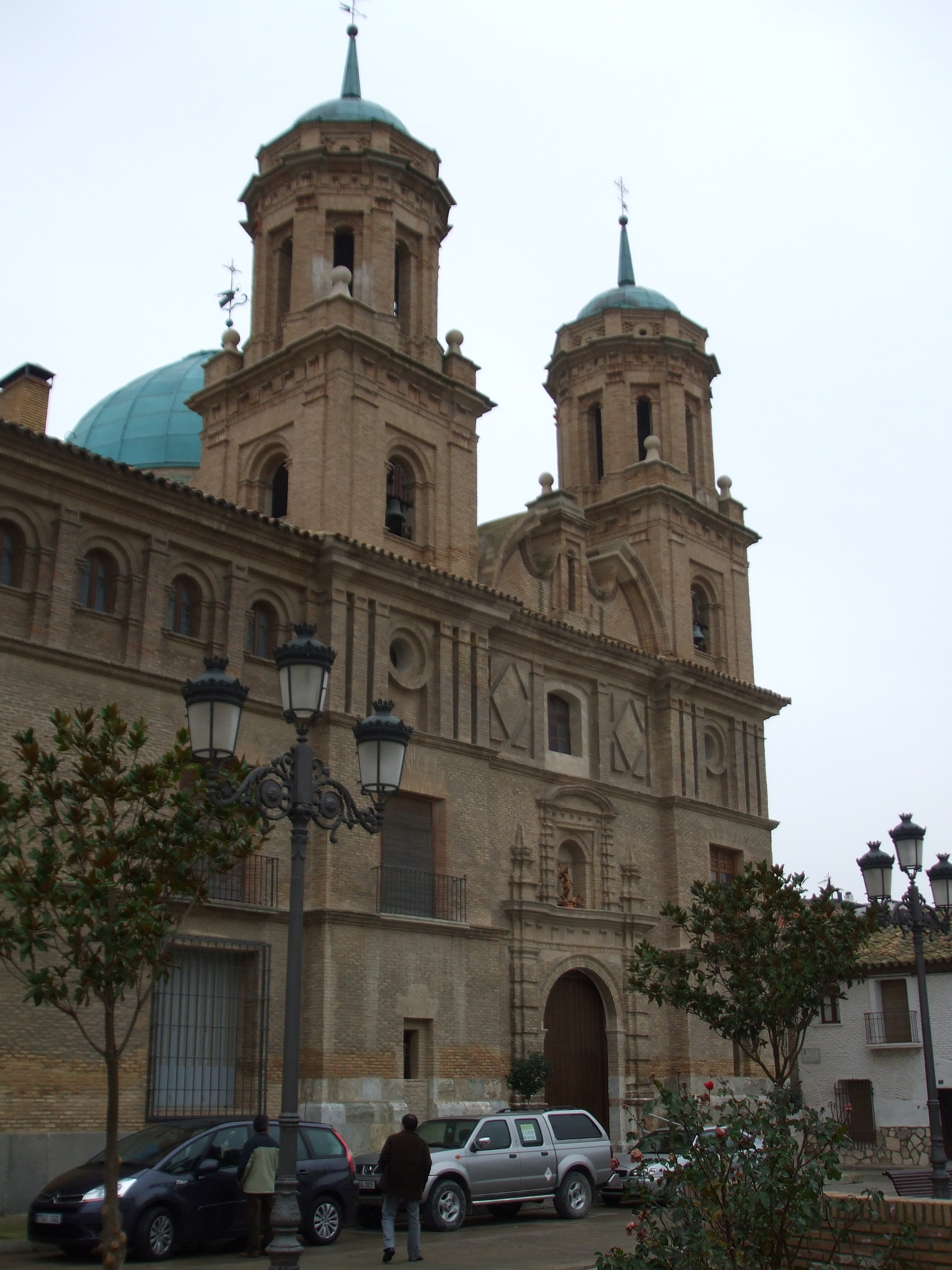 Iglesia de San Miguel en el Palacio del Marqués de Villafranca de Ebro, Villafranca de Ebro, declarado Bien de Interés Cultural con categoría de Monumento